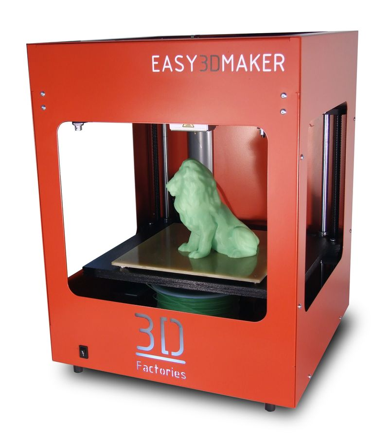 Easy3Dmaker